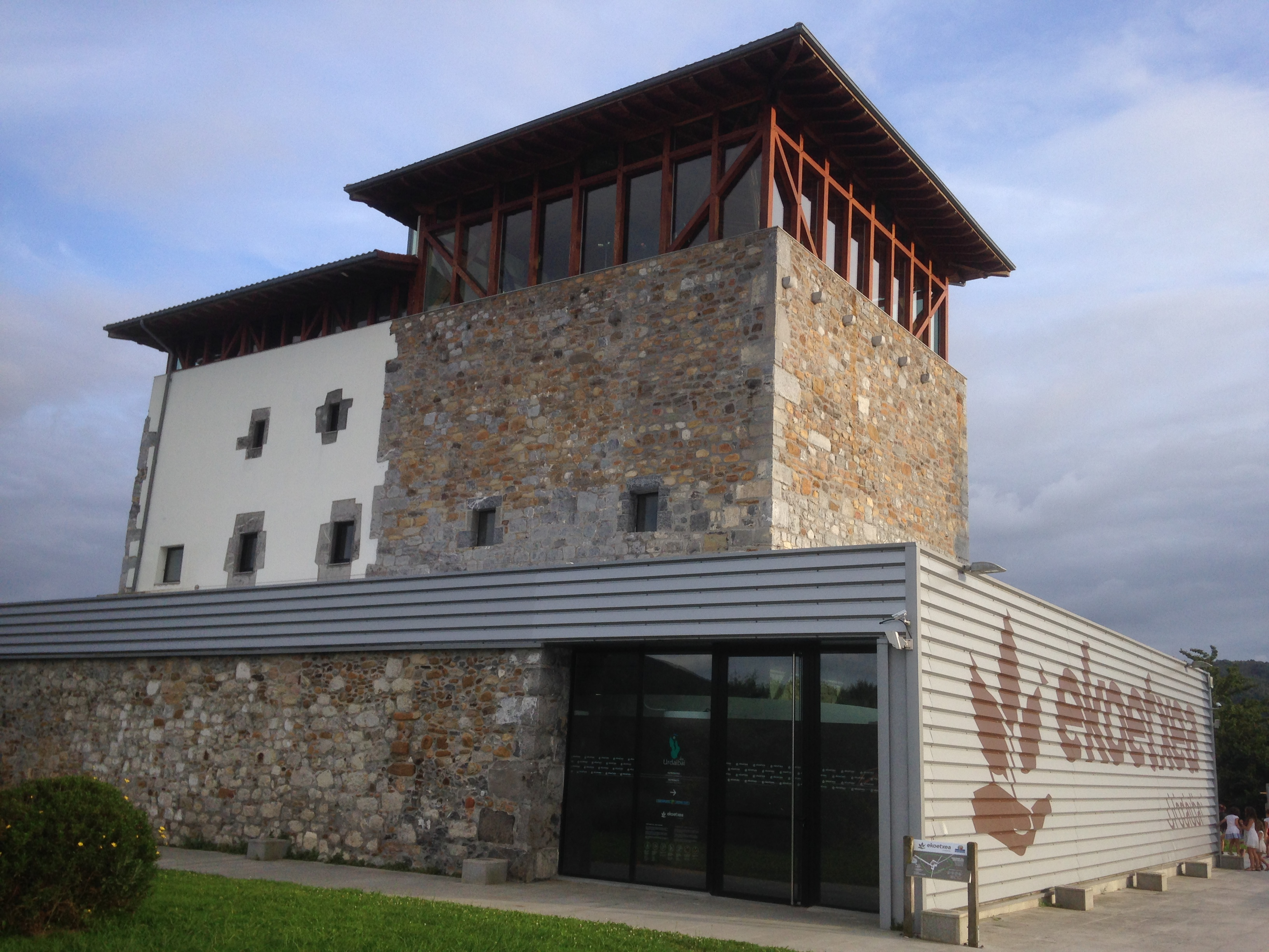 Ekoetxea Urdaibai está gestionado por Ihobe, Sociedad Pública de Gestión Ambiental del Gobierno Vasco. La sociedad pública Ihobe tiene como misión apoyar al Departamento de Medio Ambiente y Política Territorial del Gobierno Vasco en el desarrollo de la política ambiental y en la extensión de la cultura de la sostenibilidad ambiental en la Comunidad Autónoma del País Vasco. Ocupa la Torre Madariaga de la localidad vizcaina de Busturia en el País Vasco, España.